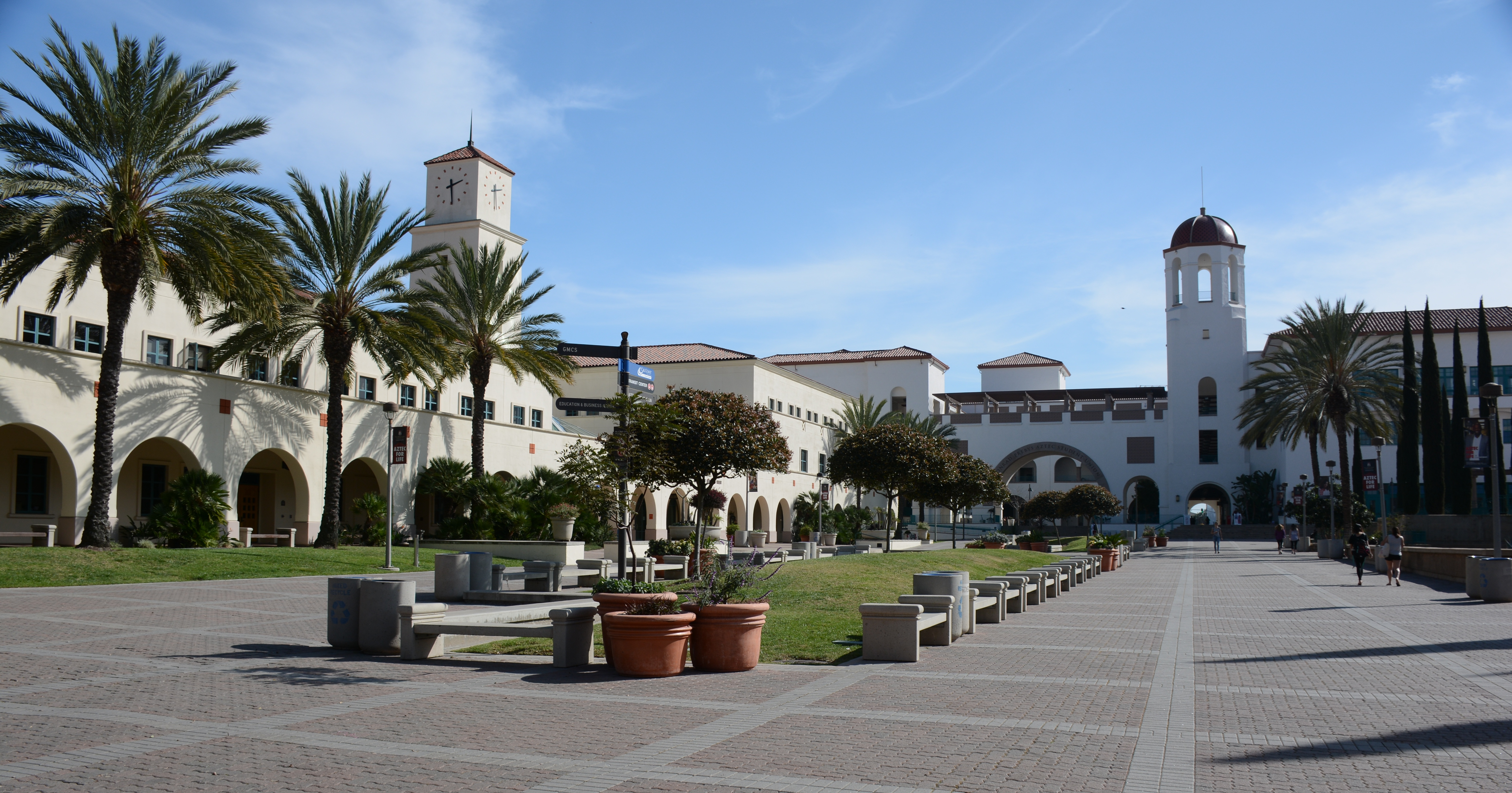 College West, San Diego, CA, USA